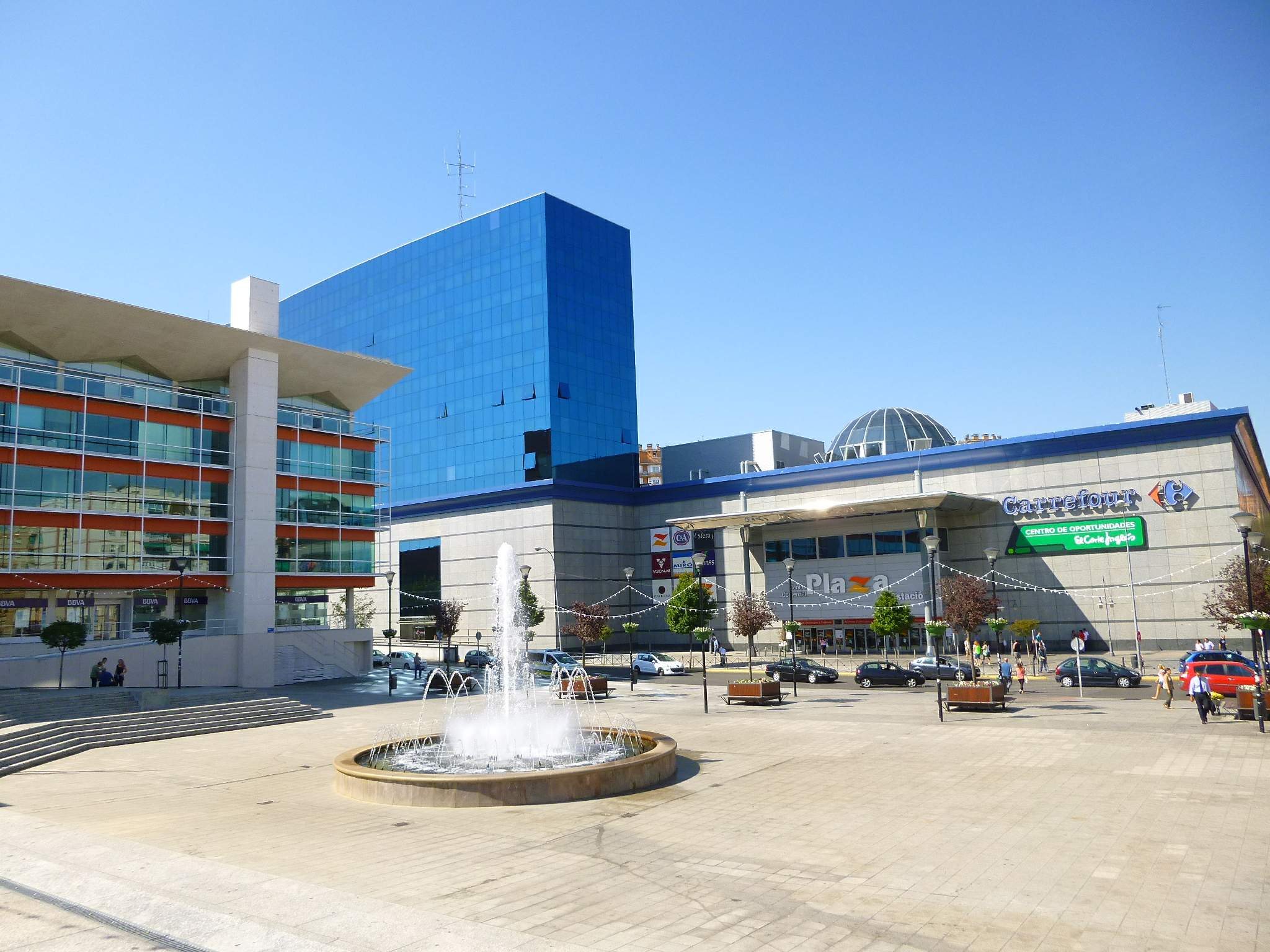 Plaza de la Constitución, Fuenlabrada